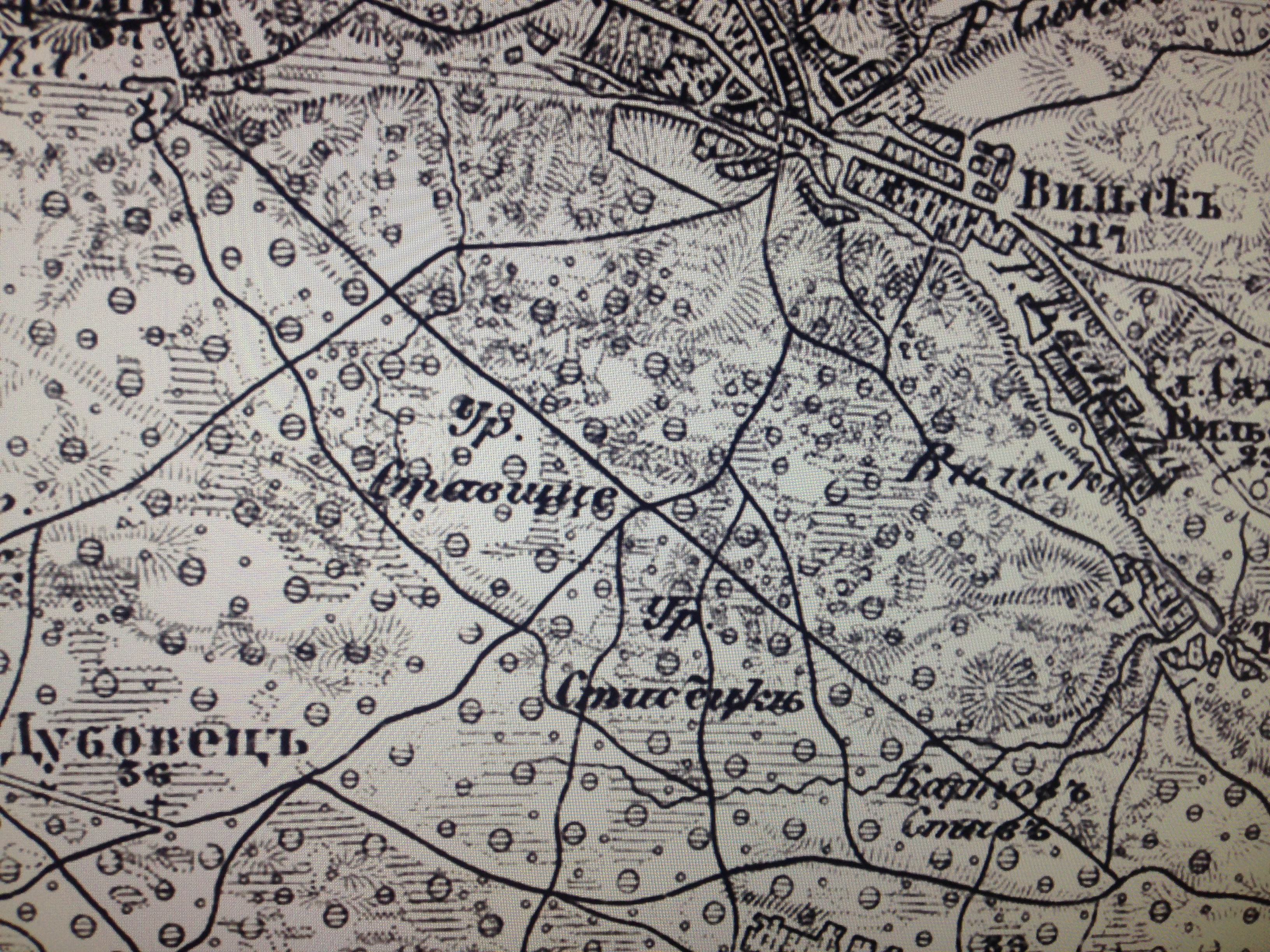 фото